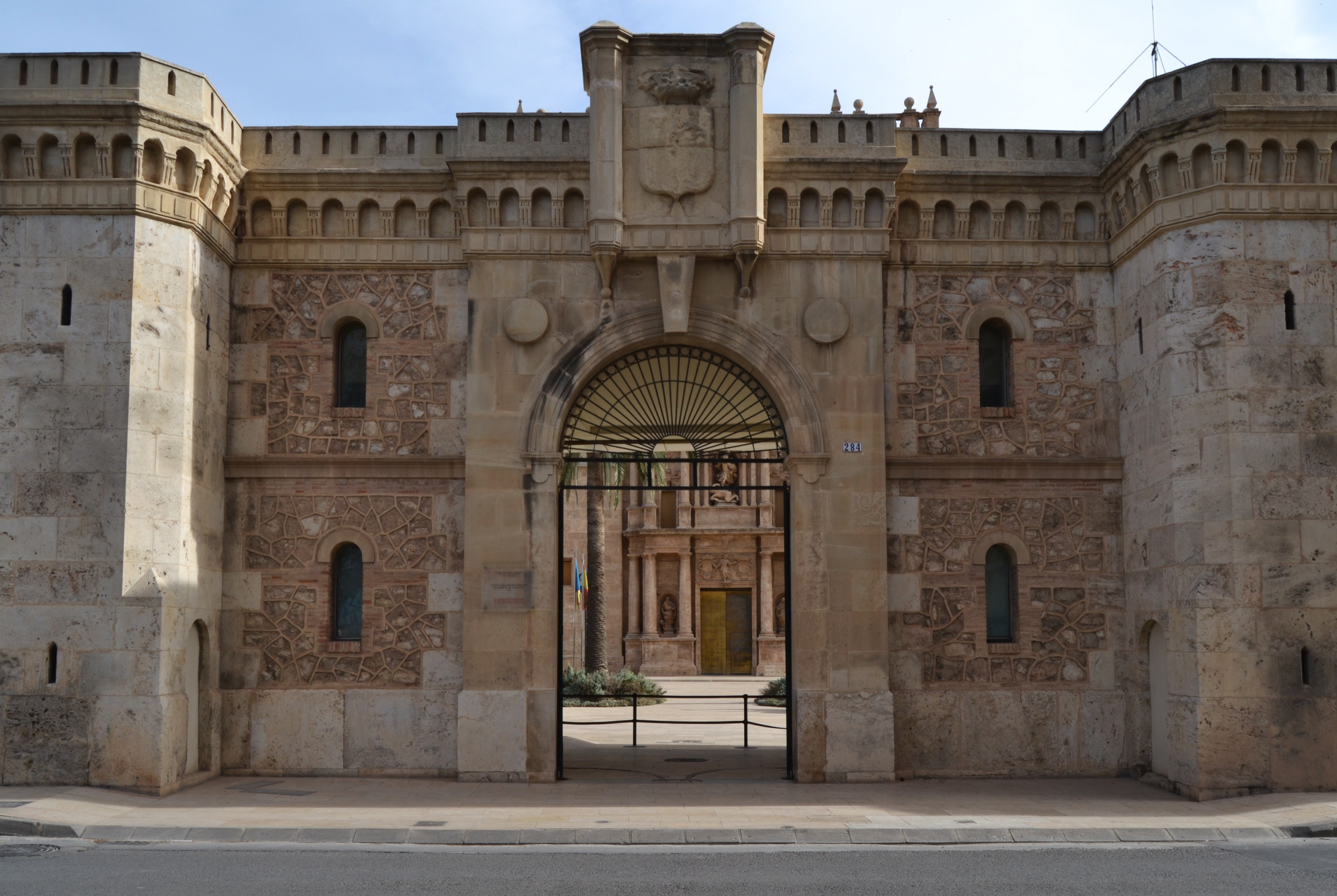 Porteria del monestir de sant Miquel dels reis, València.